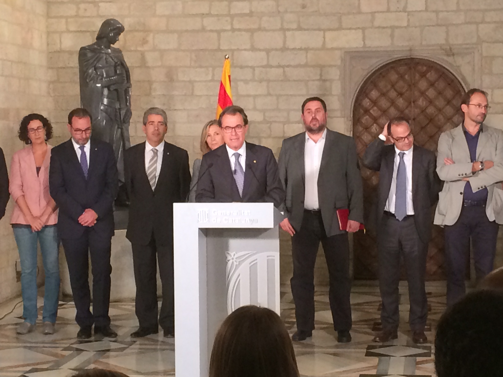 President Mas a la reunió dels partits proconsulta